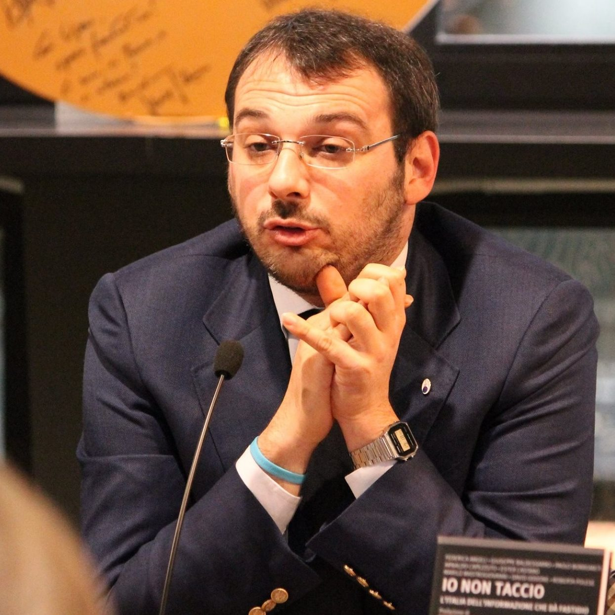 Paolo Borrometi